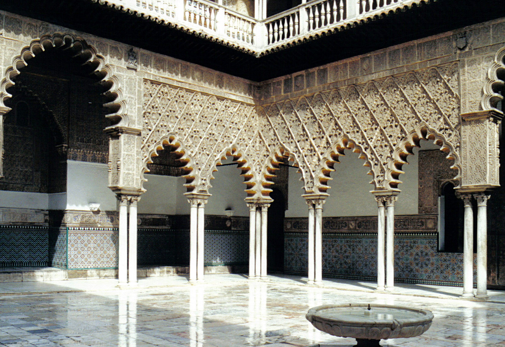 Alcazar de Séville - Patio de la Doncellas inspiré de l'architecture post-omeyyade des royaumes de taïfas